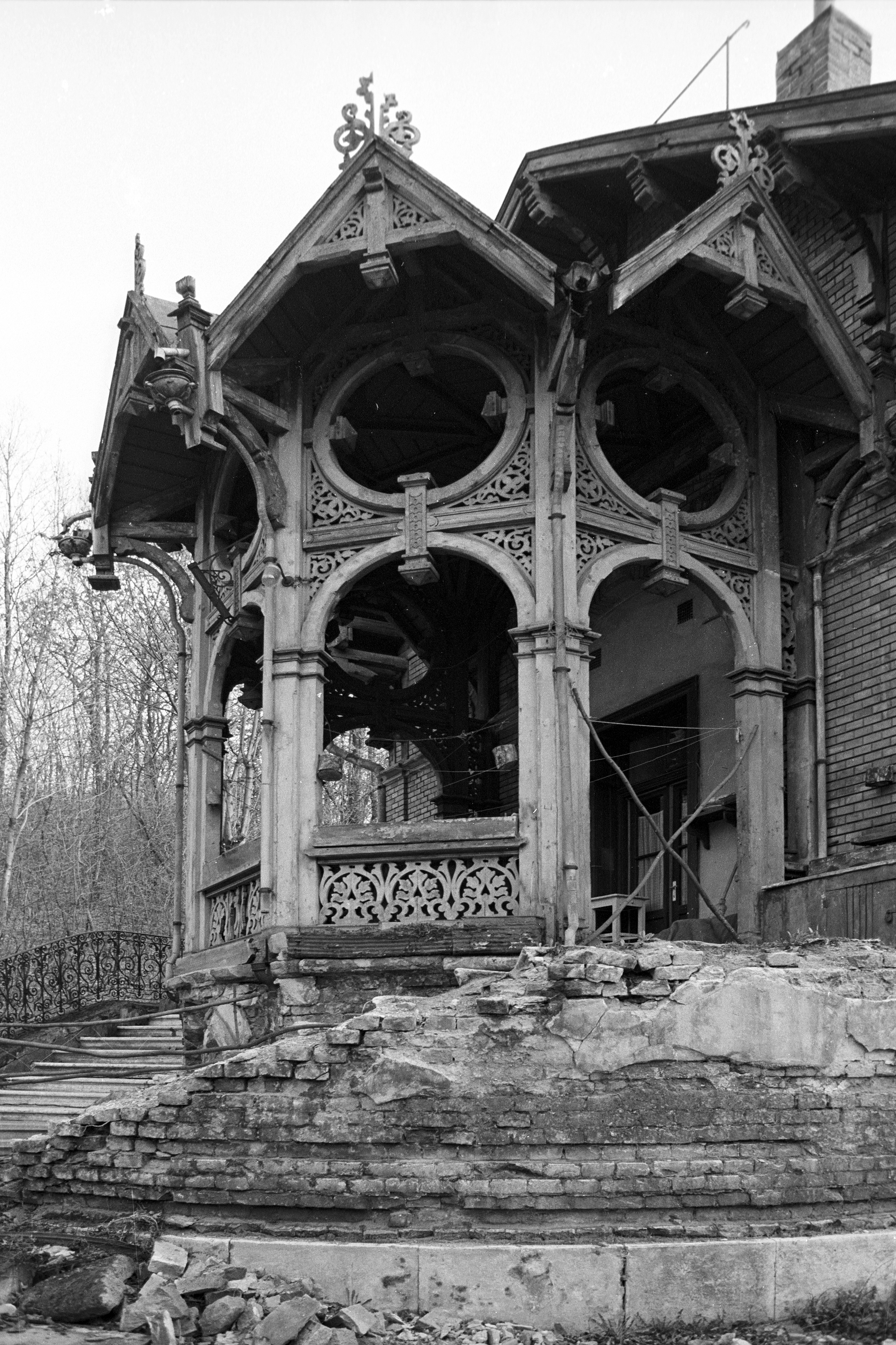 BUDAPEST XII. Zugligeti út 64., a régi villamos (eredetileg lóvasút) végállomás.